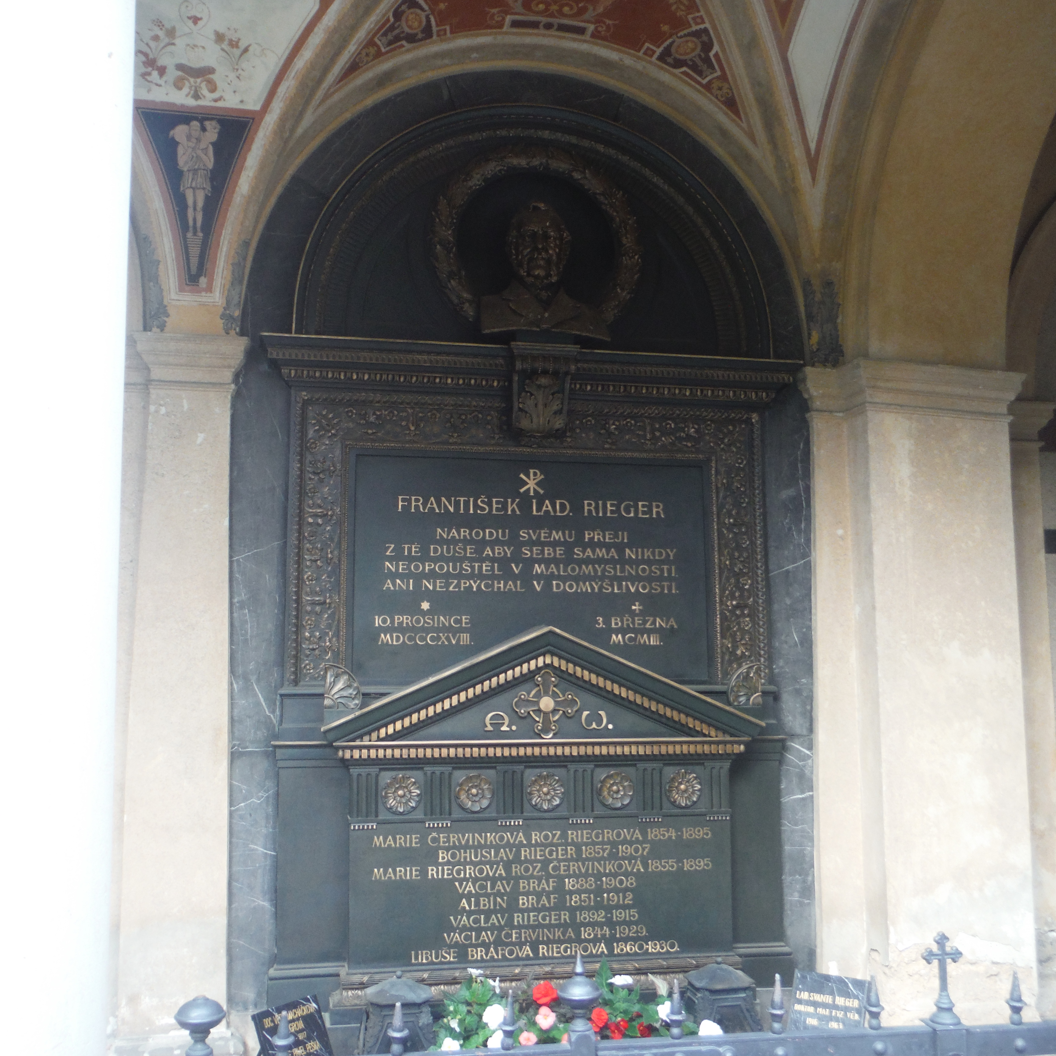 HROB